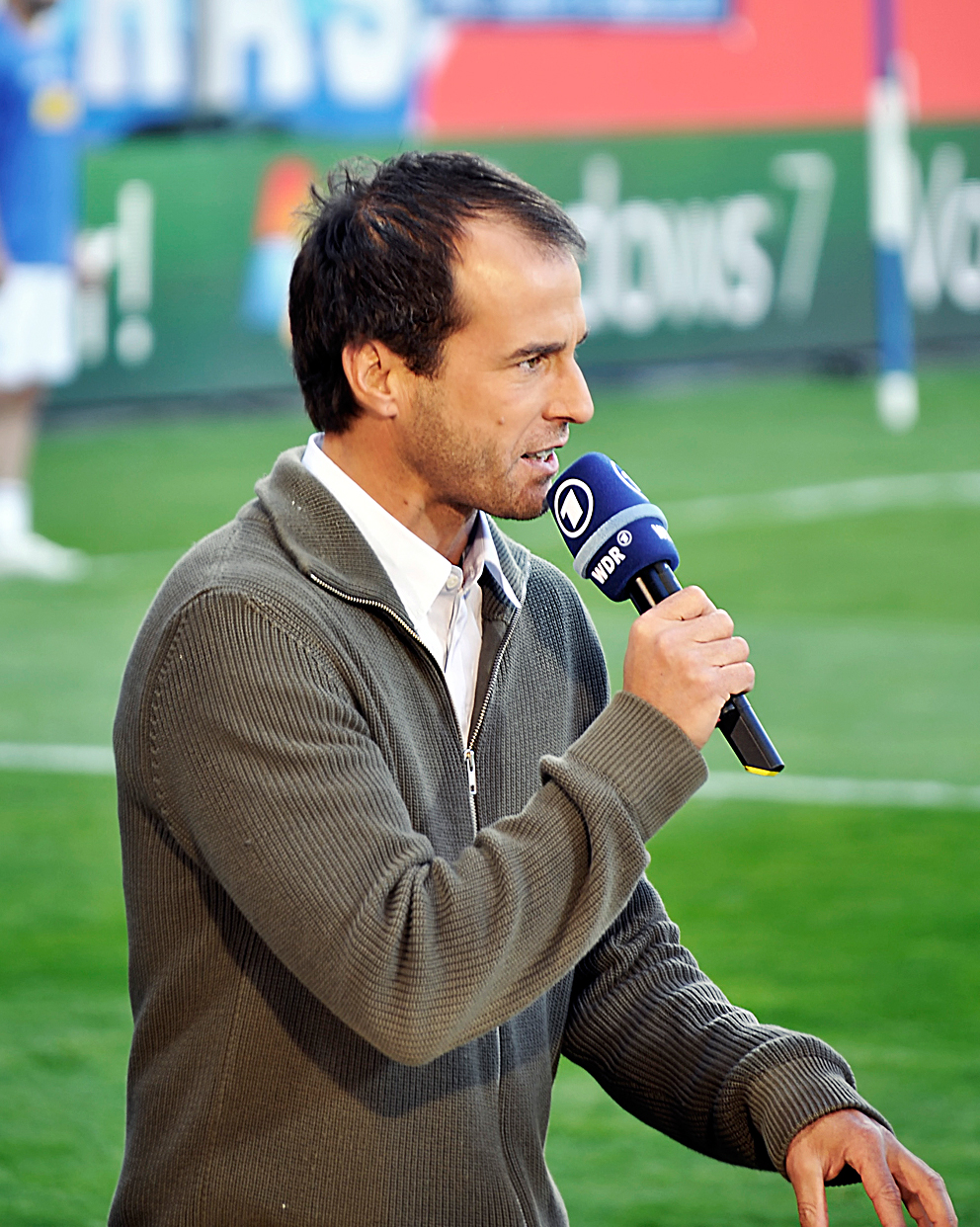 Mehmet Scholl für den WDR beim Relegationsspiel 2011 in Bochum